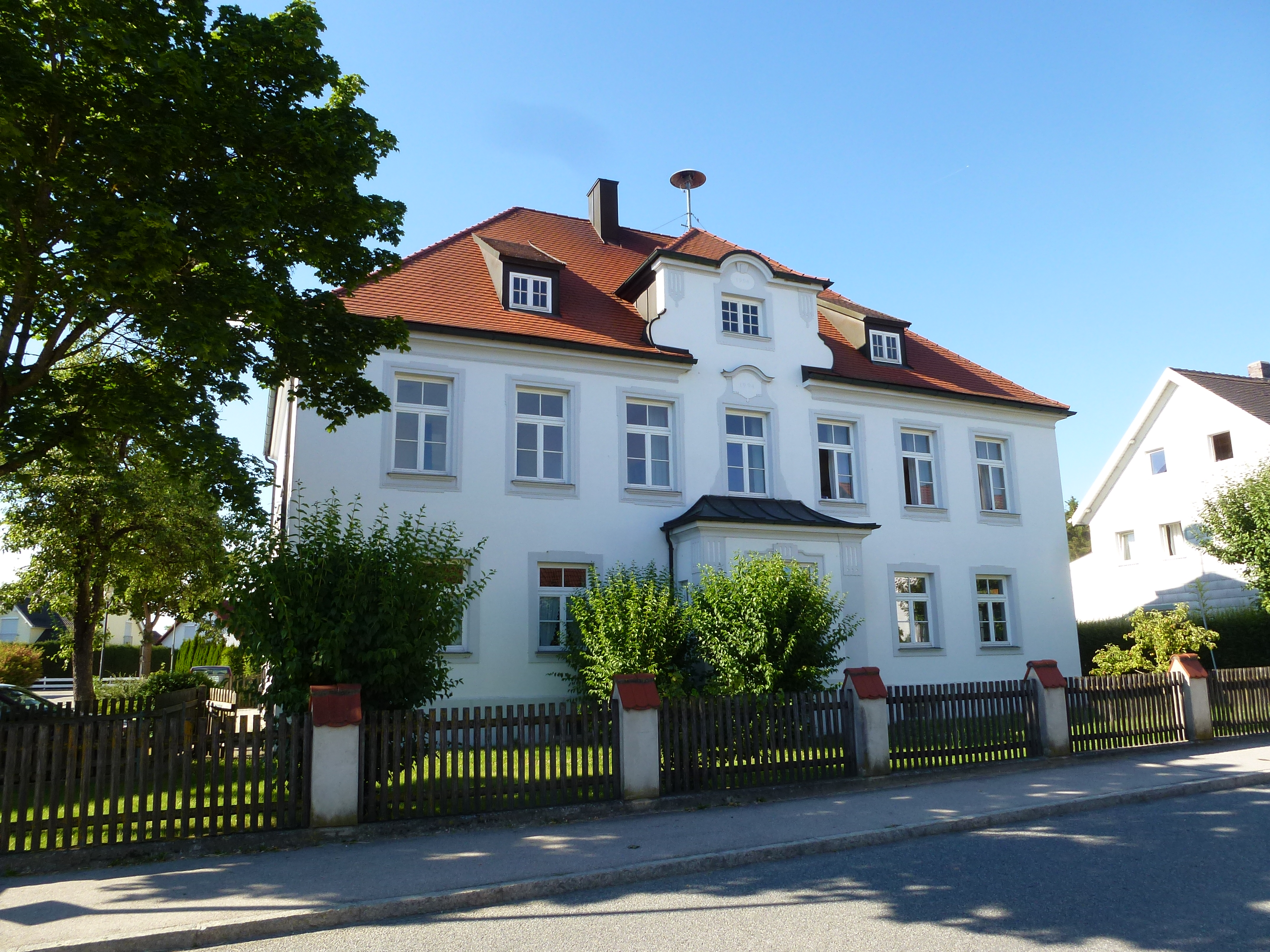 Gde Egenhofen (LKr Fürstenfeldbruck), Bgm.Schräfl-Str.2, Ehemaliges Schulhaus. Ansicht von S